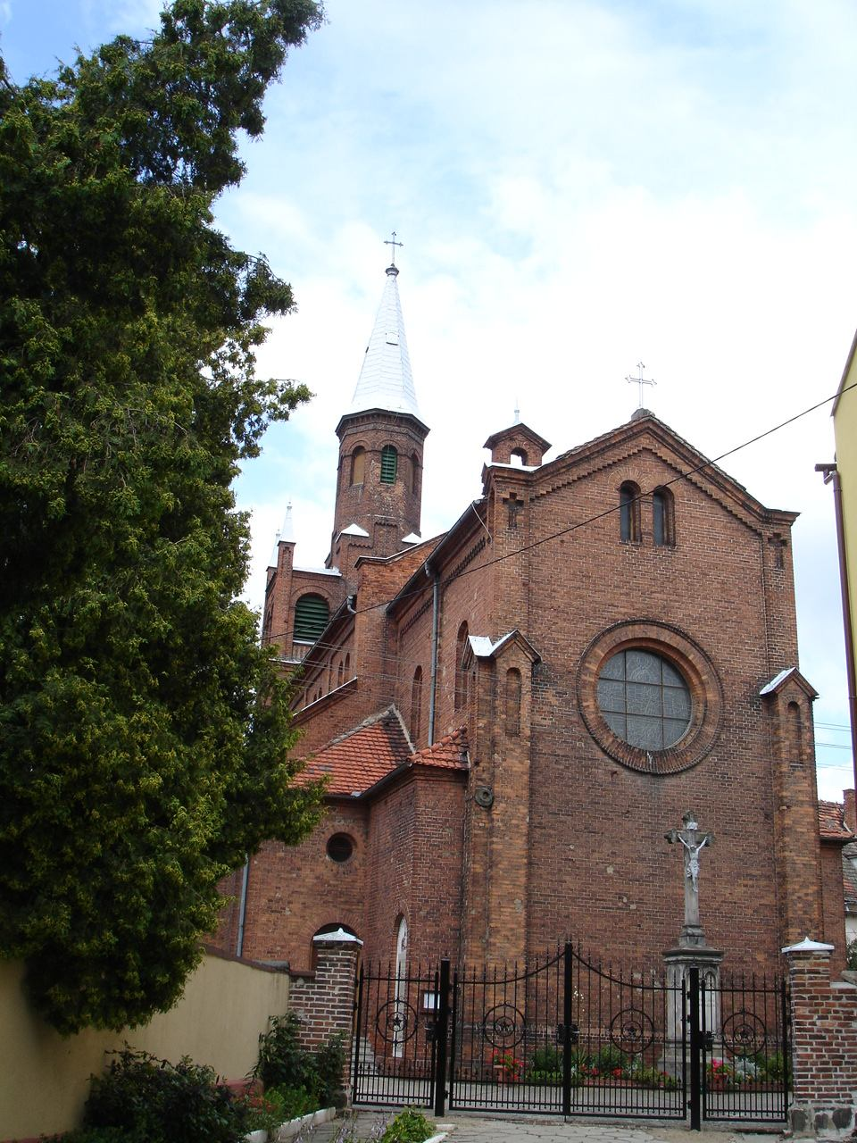 Skorogoszcz parish.